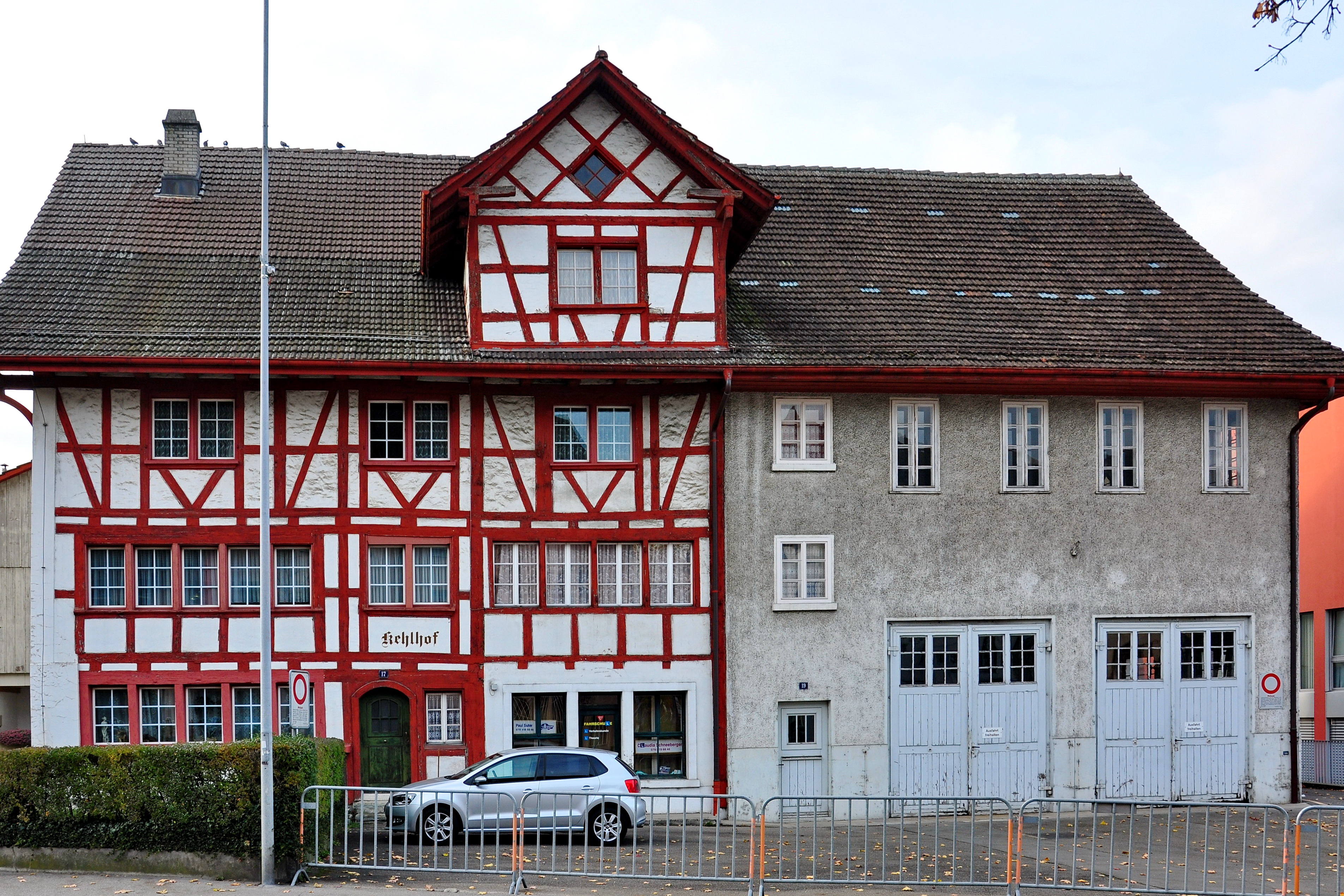 Kehlhof in Dübendorf (Switzerland)